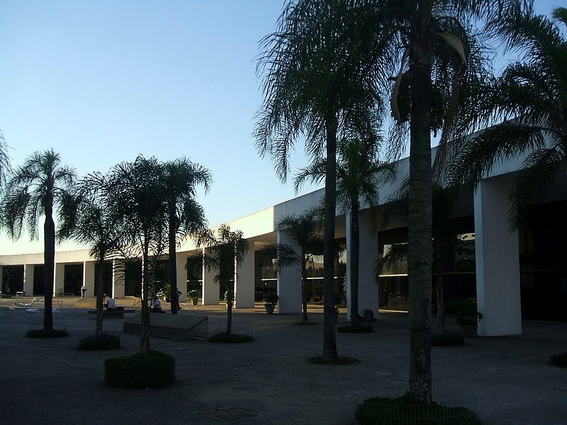 Pavilhão da Criatividade, de Oscar Niemeyer. Memorial da América Latina. São Paulo, Brasil.